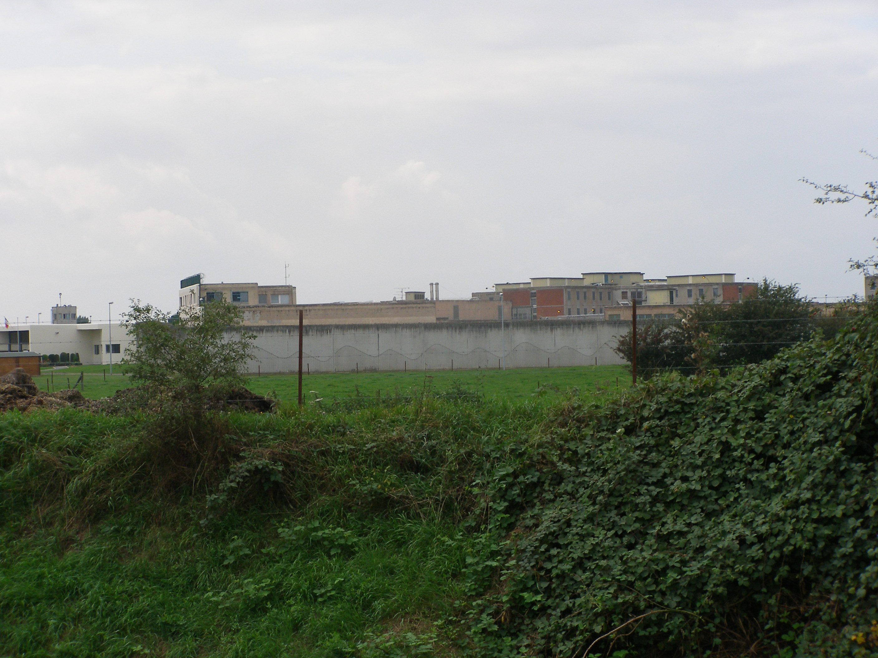 Le centre pénitencier.